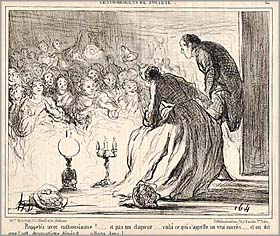 Les Comediens de Société by Honoré Daumier